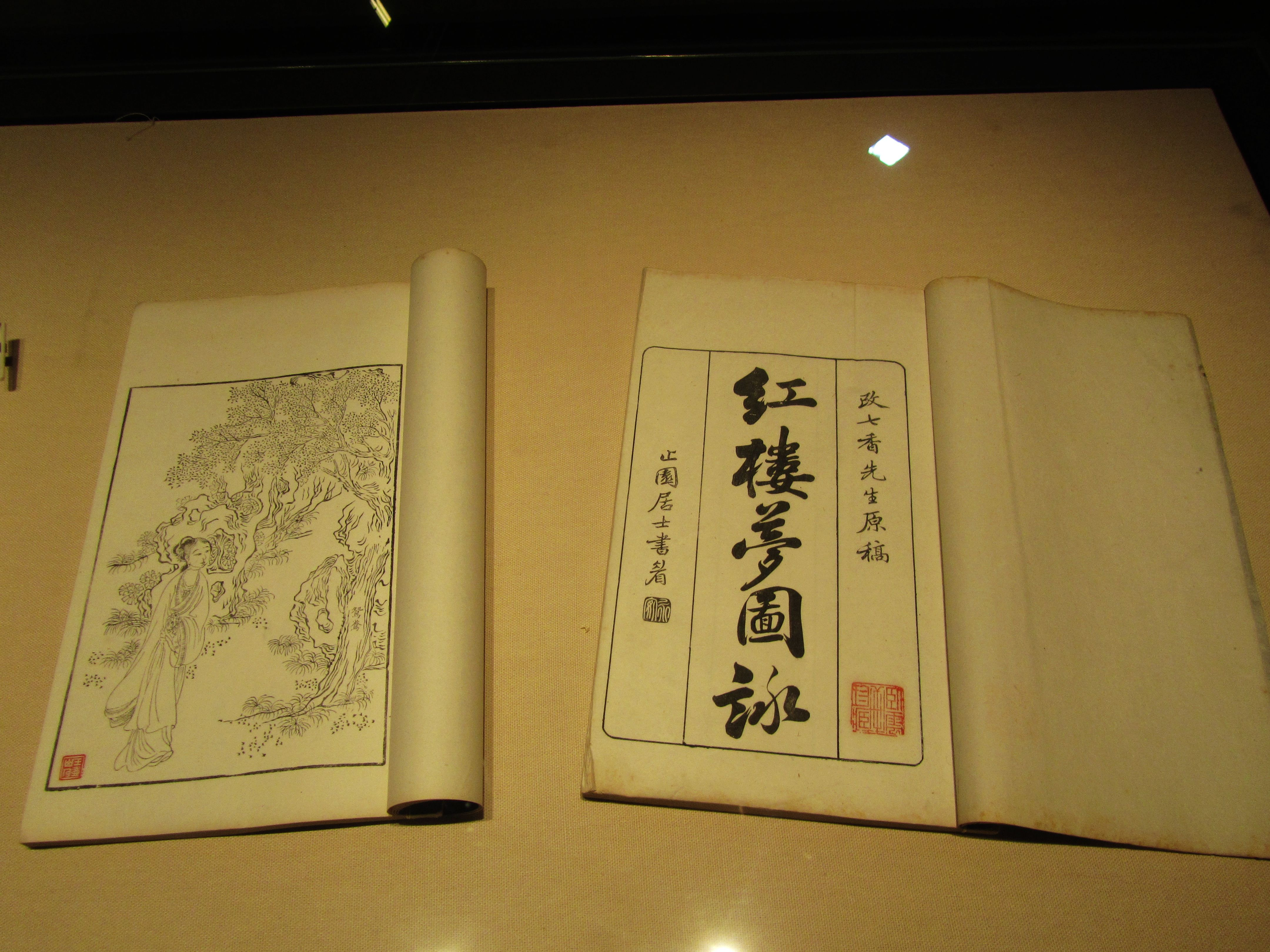 改琦所绘《红楼梦图咏》，江宁织造府博物馆藏。